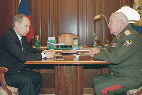 МОСКВА, КРЕМЛЬ. С председателем Российского комитета ветеранов войны и военной службы, вице-президентом Всемирной ассоциации ветеранов войны Владимиром Говоровым.